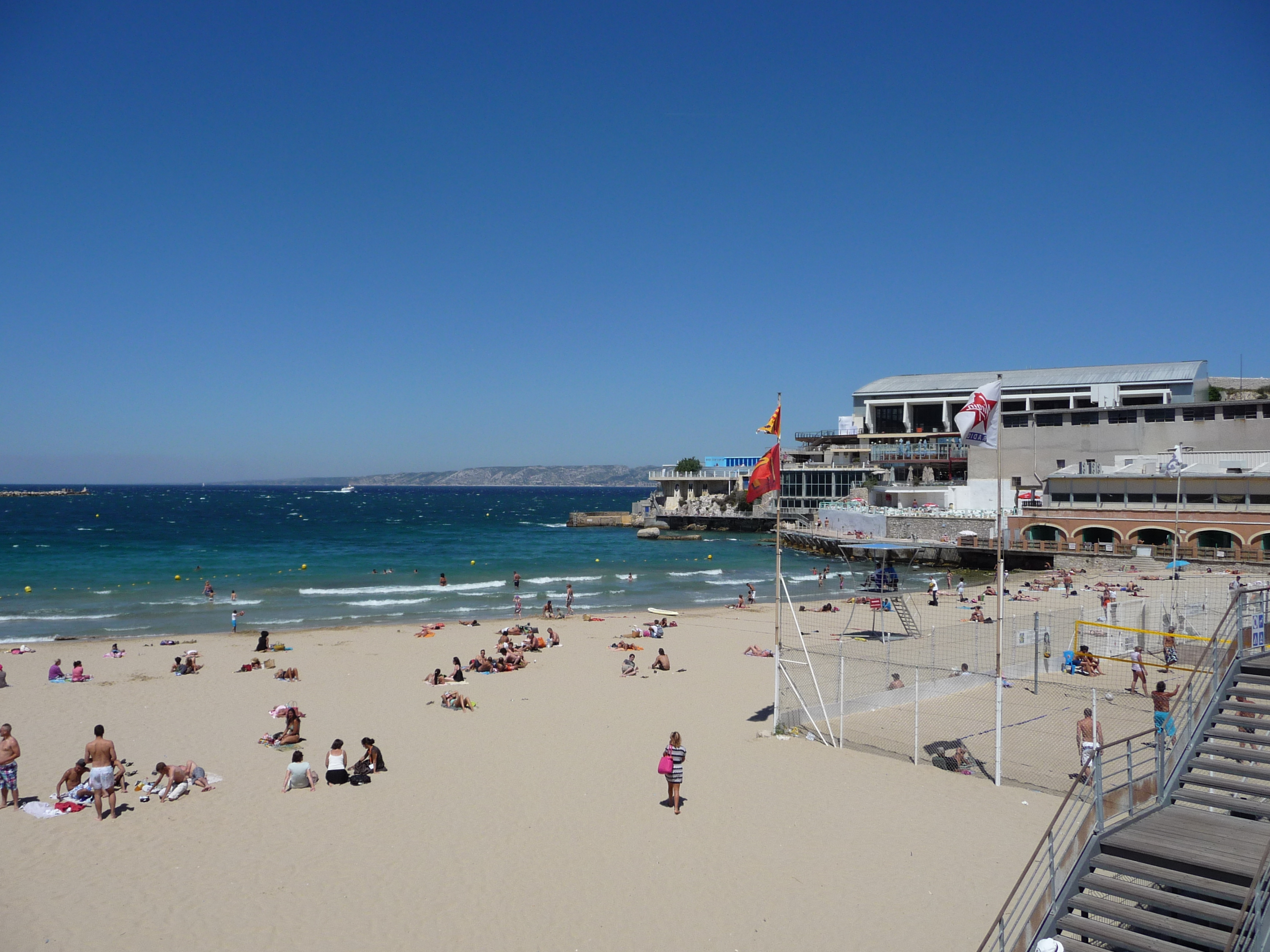 La plage des catalans, Marseille